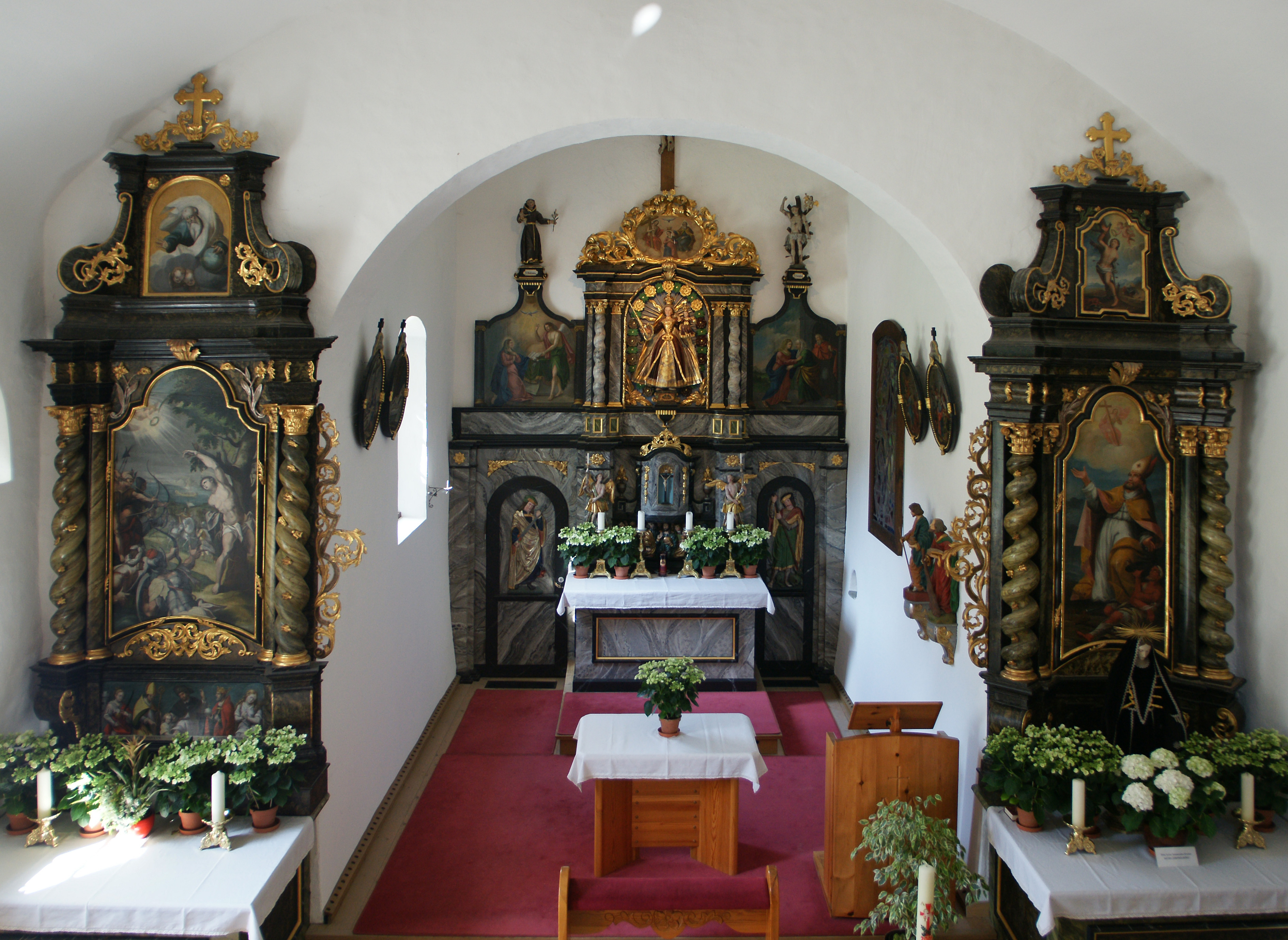 Die Wallfahrtskapelle Unsere Liebe Frau und Hl. Sebastian, auch Venser Bild genannt, ist eine römisch-katholische Kapelle im Ortsteil Vens in (Vandans im Montafon.